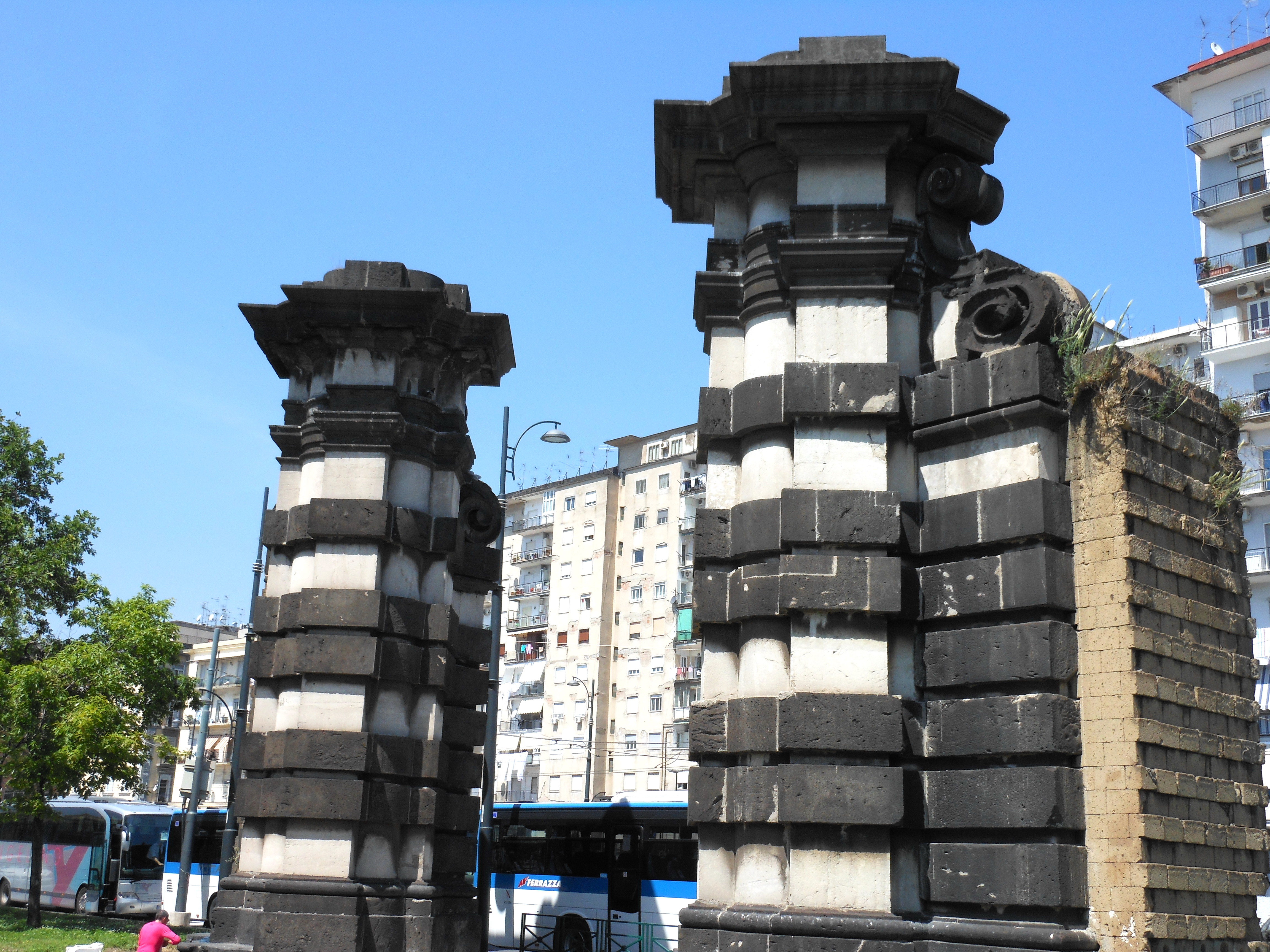 Vado del Carmine in via Marina a Napoli